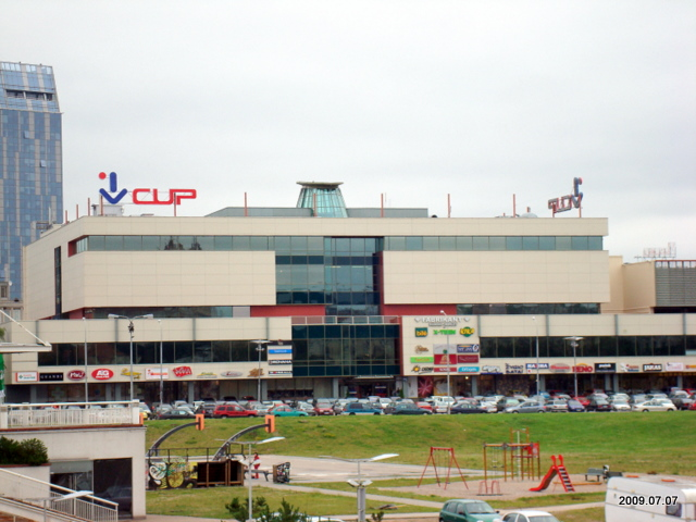 Šnipiškės, Vilnius, Lithuania